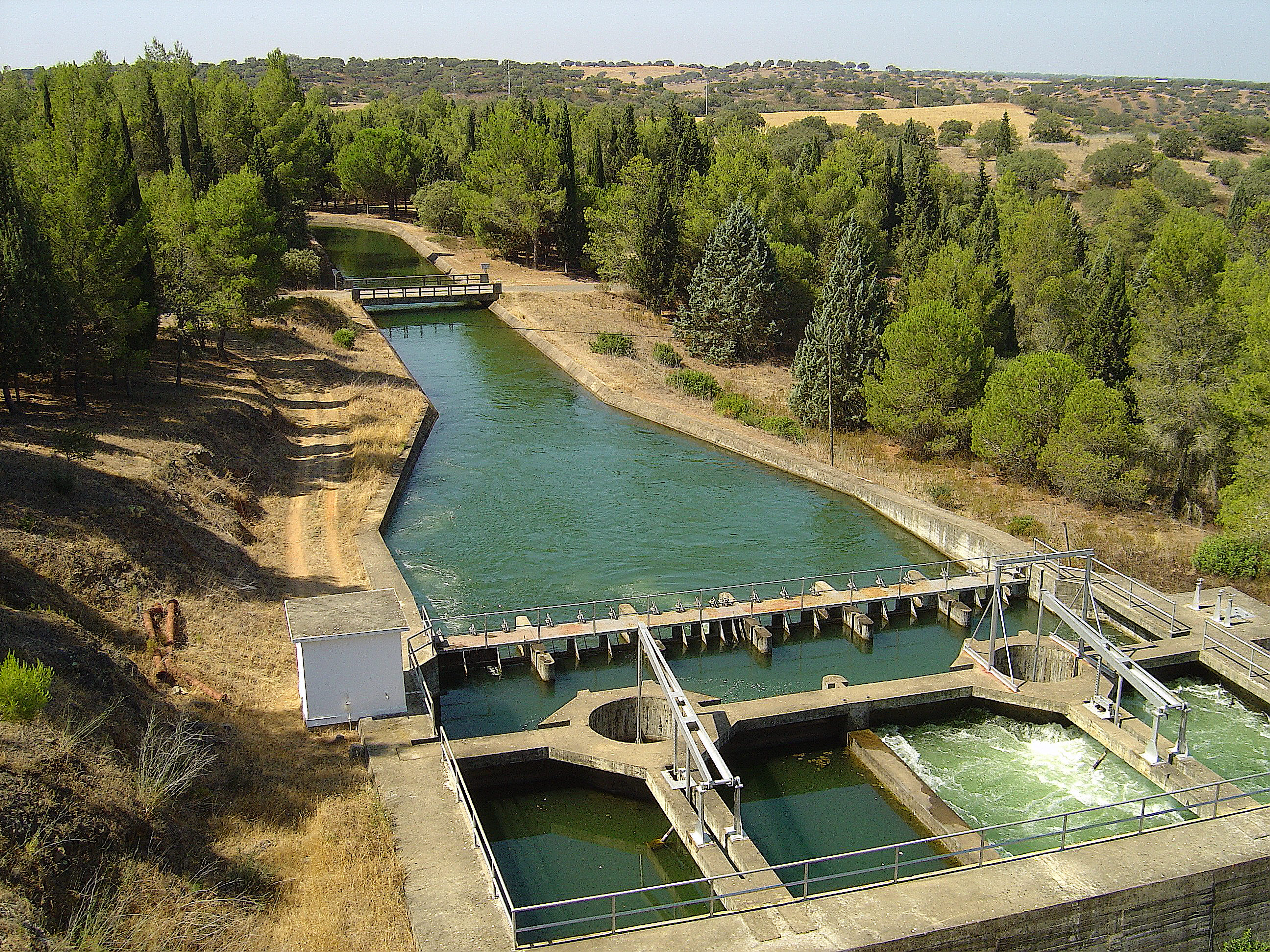 Barragem de Odivelas - Ferreira do Alentejo Fotografia de Vitor Oliveira, integrada na colecção com o endereço